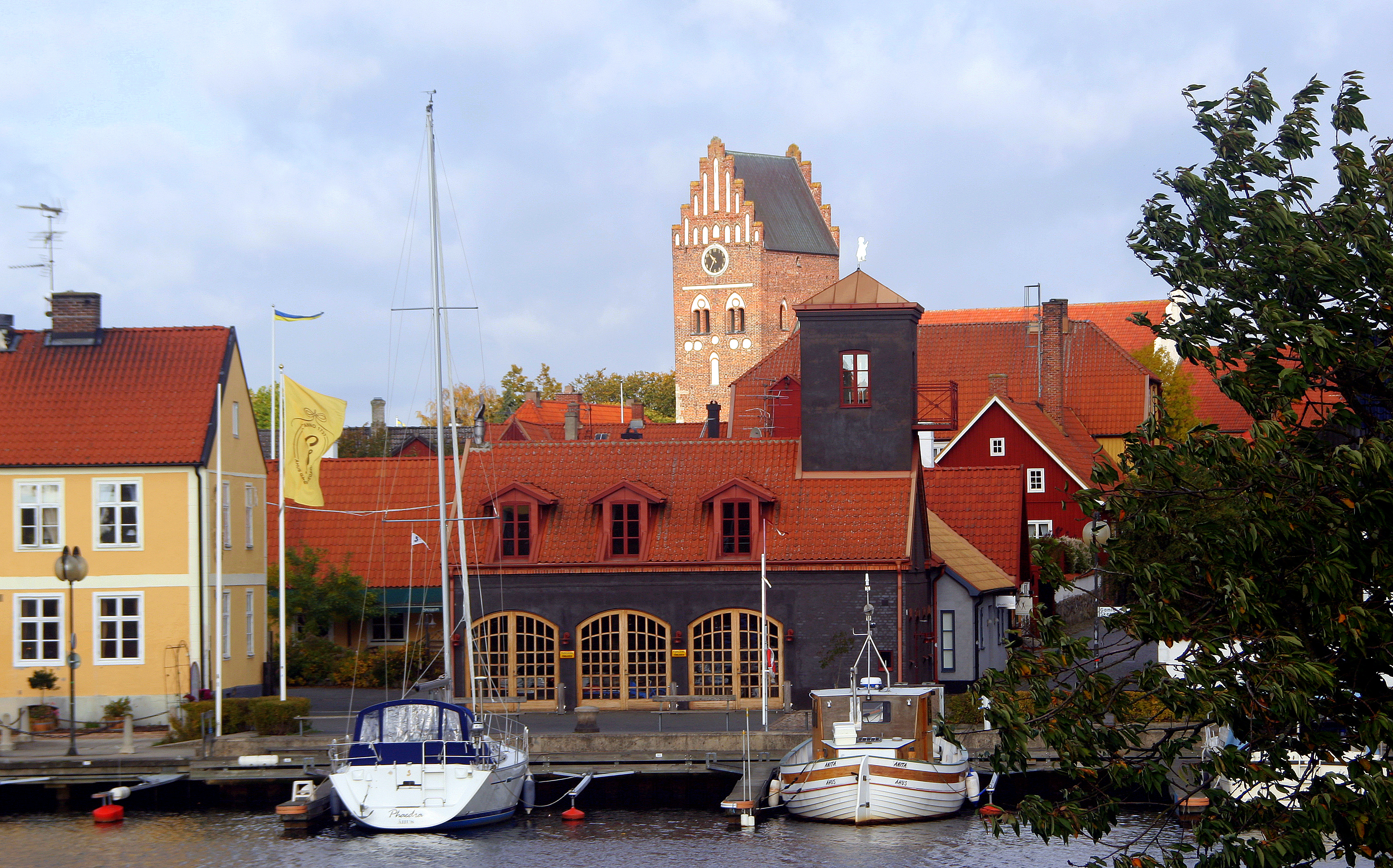 Sankta Maria kyrka och bybebyggelse i Åhus sett från andra sidan ån.